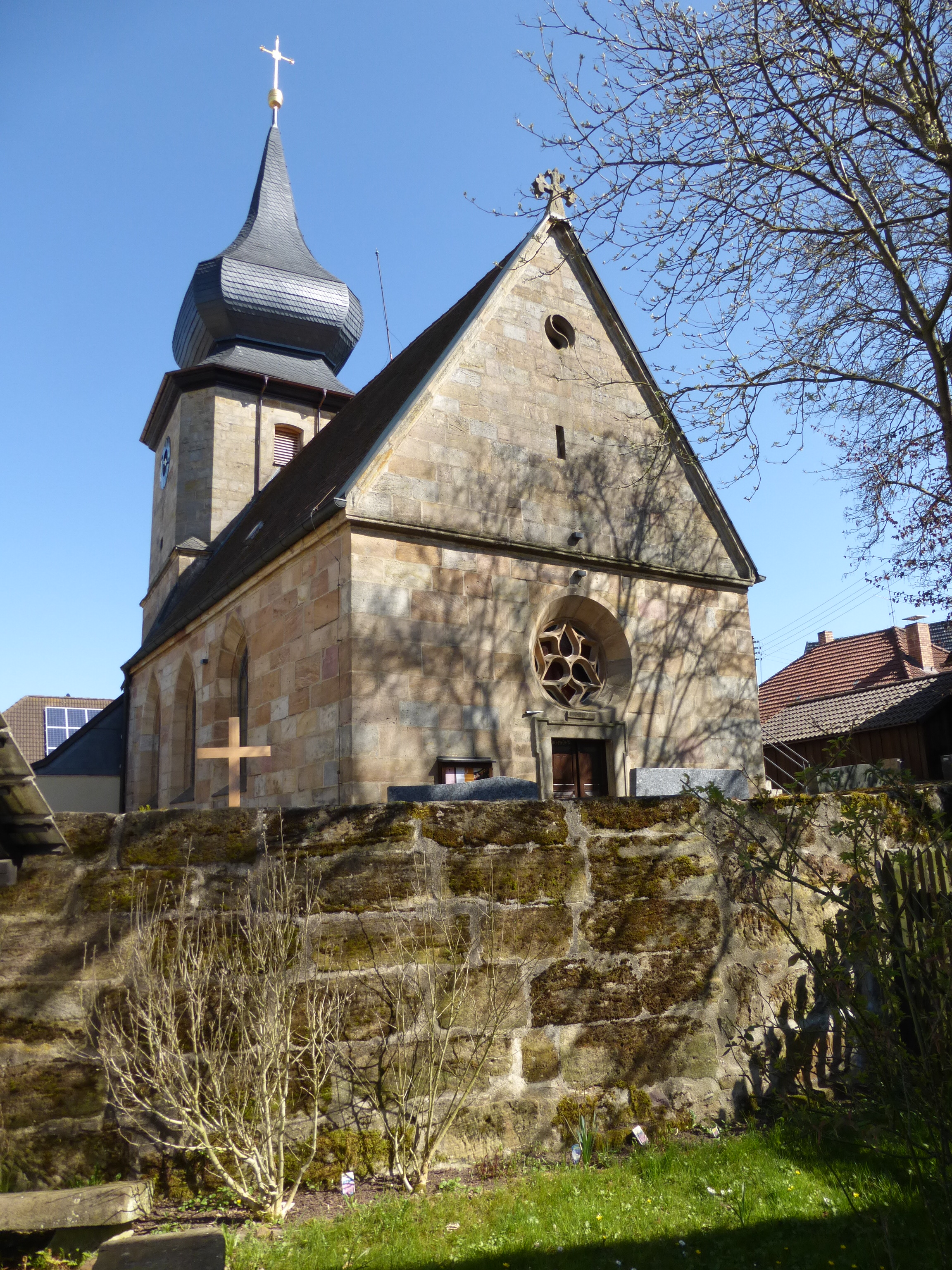 D-4-77-136-34